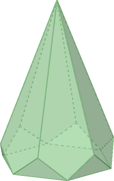 反六角錐的模型